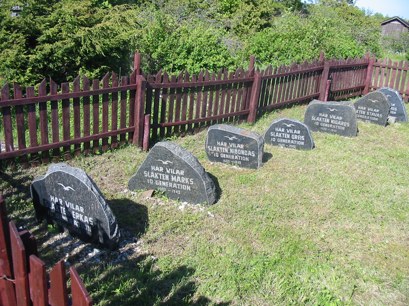 Siim Sepp, 2003